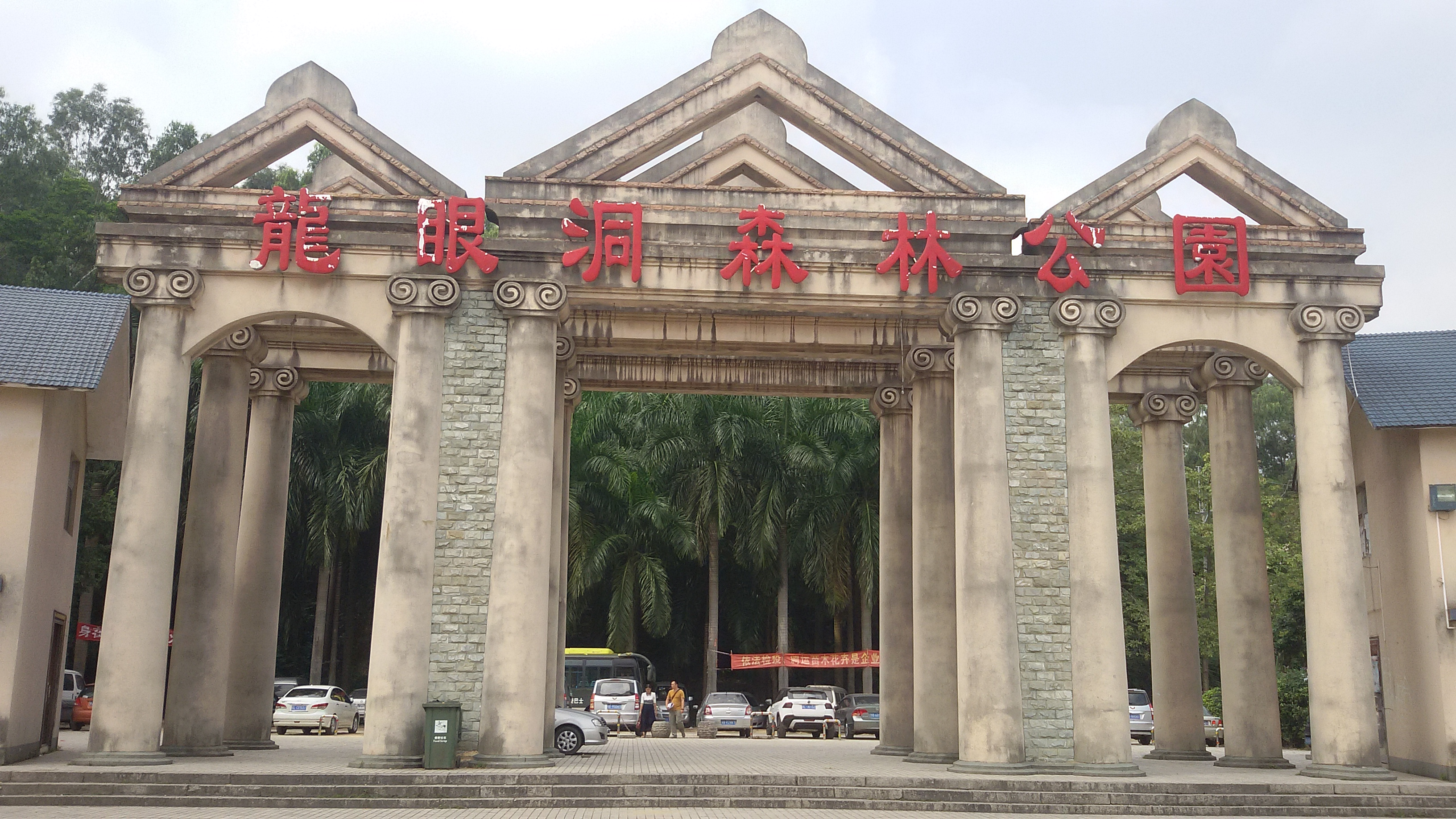 粵語: 龍眼洞森林公園正門